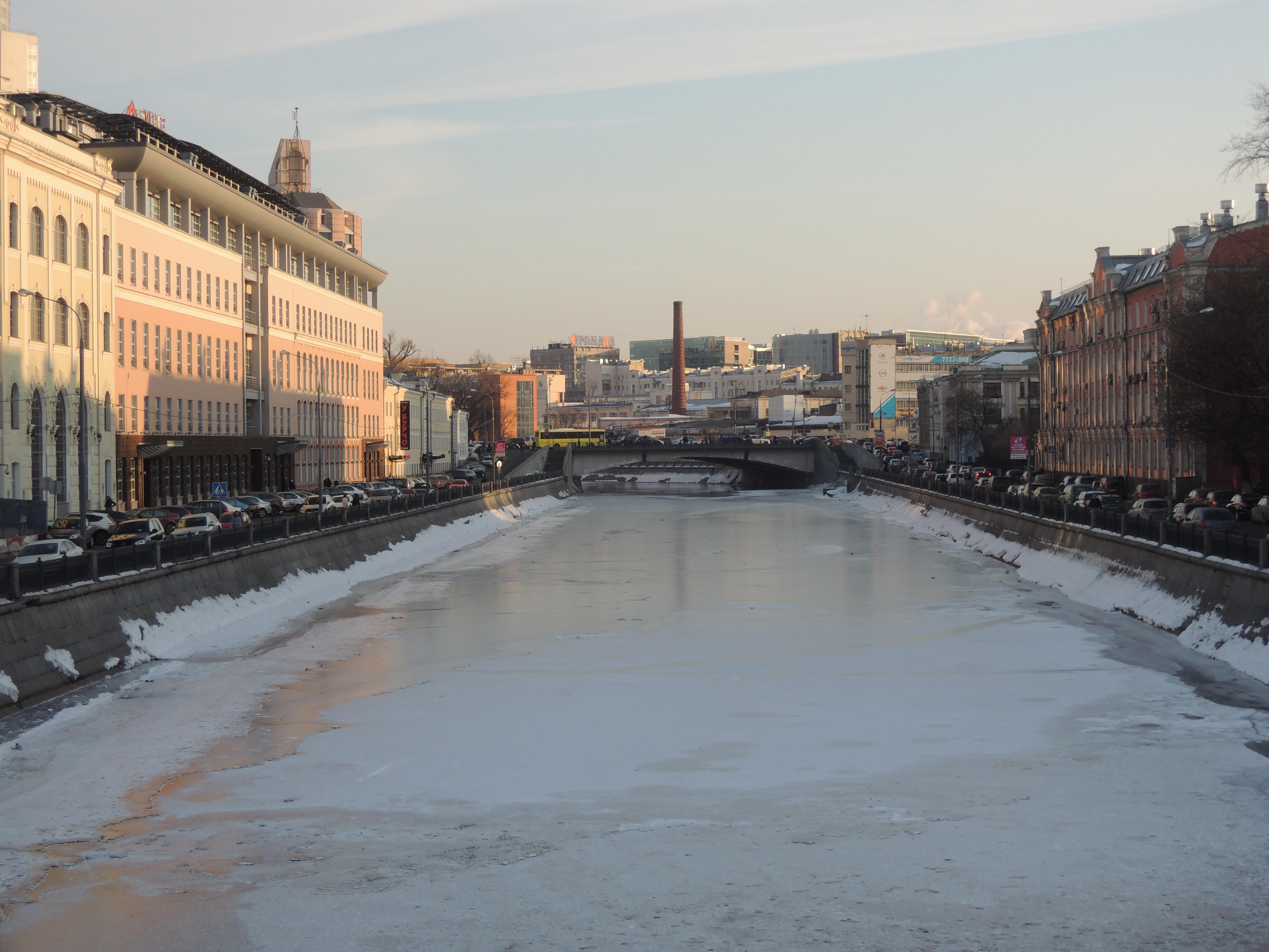 Озерковская набережная, зима 2013 года